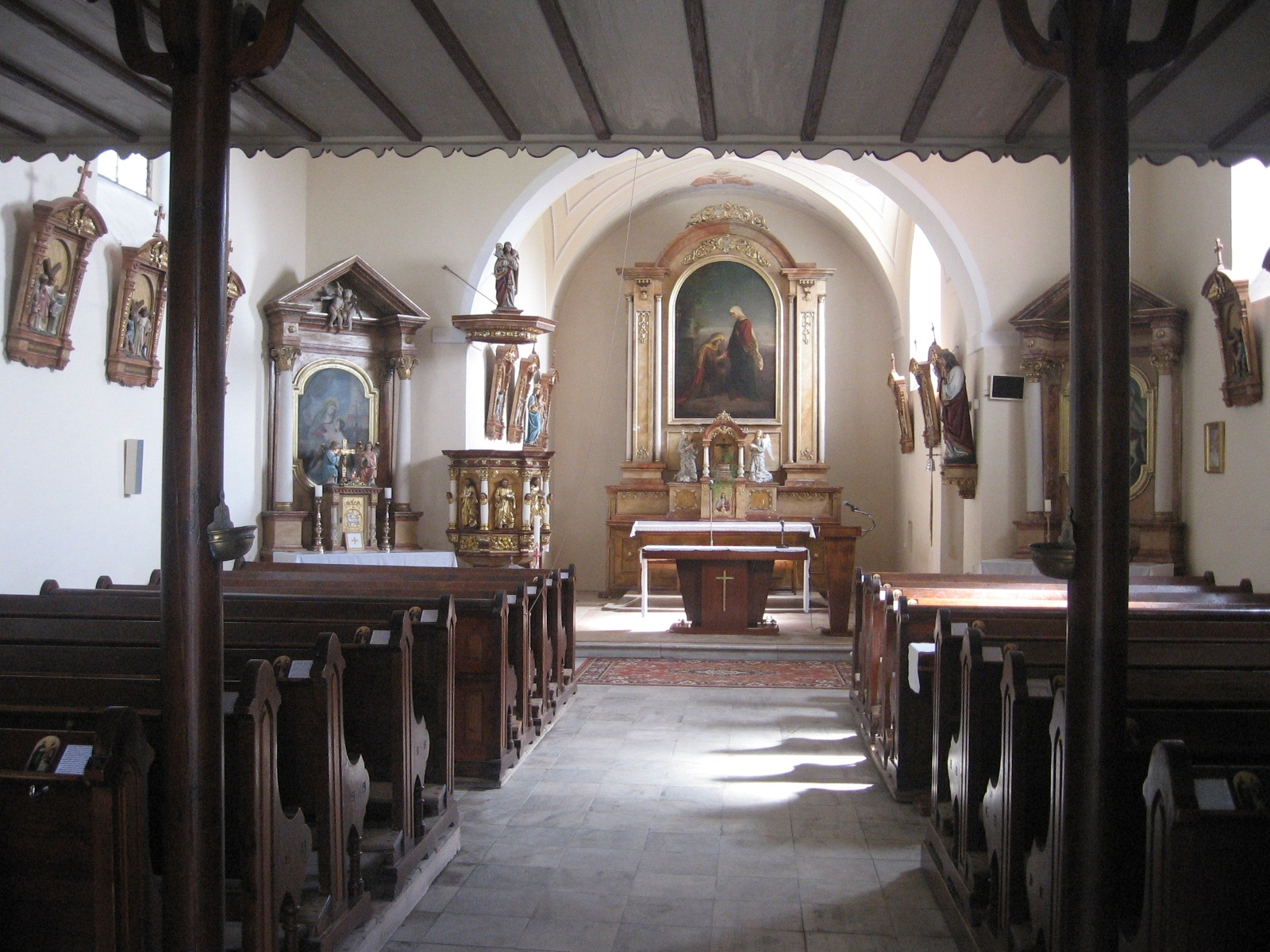 Kostel Navštívení P. Marie (Boušín), Boušín